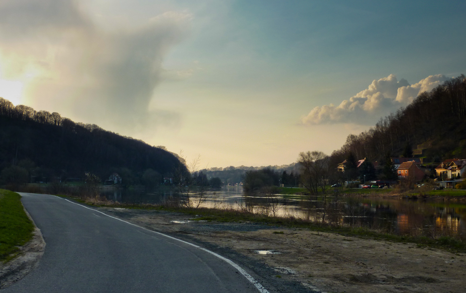 Elberadweg bei Niedervogelgesang mit Blick auf (Ober-)Posta, beides Pirnaer Stadtteile